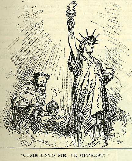 Political Cartoon